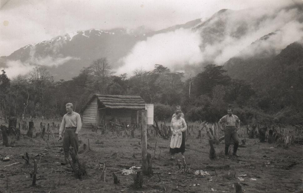 Colonos alemanes en Puyuhuapi, con incendios para despejar el área al fondo, hacia 1930. - das helle Gebilde am Pfahl in der Mitte ist ein Hellmann-Niederschlagsmesser.